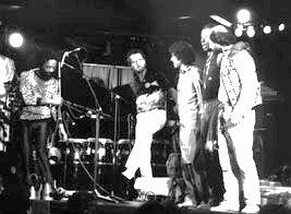 Atilla Engin arşivinden